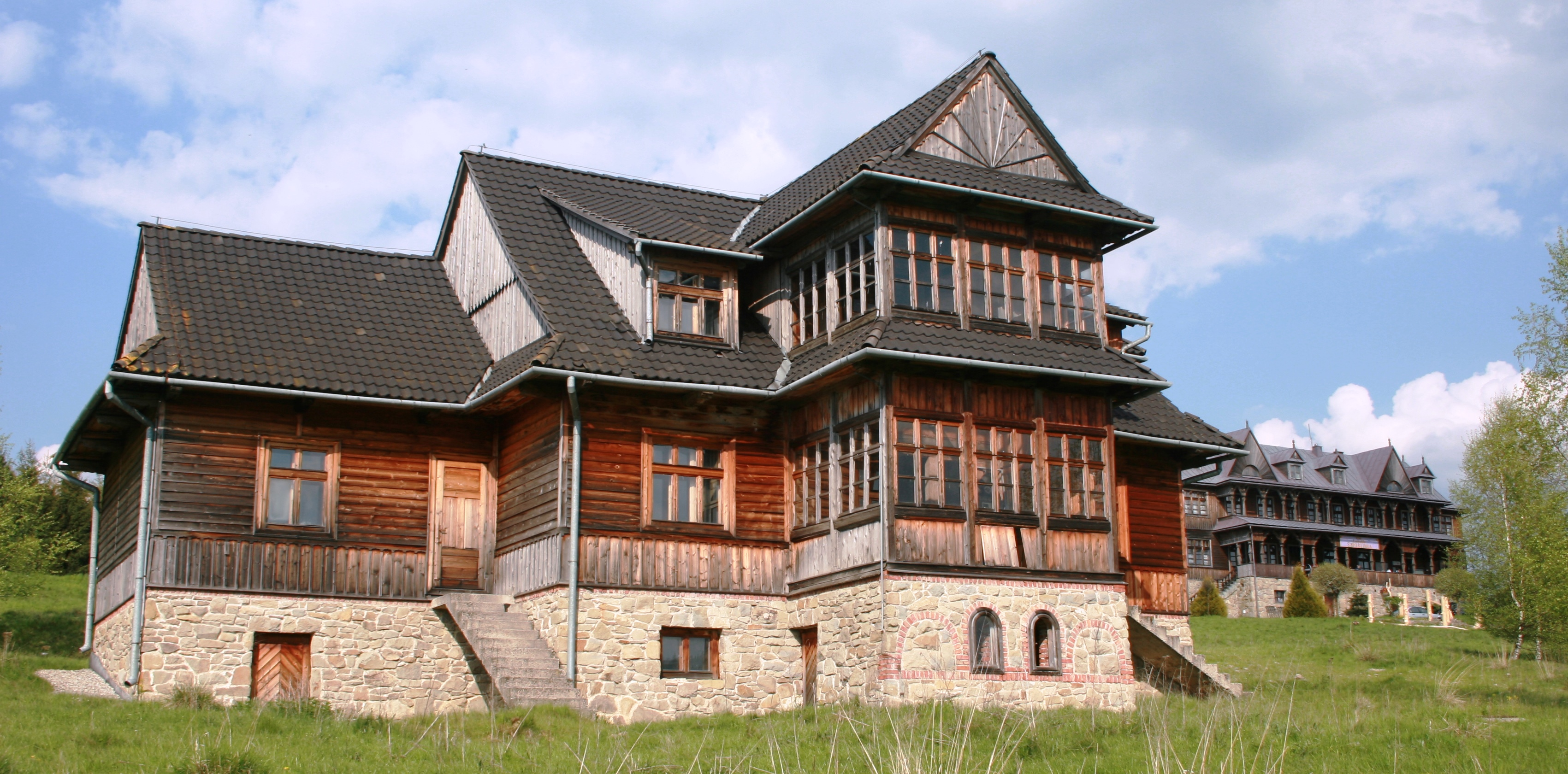 Willa Zbyszek w Osadzie Czorsztyn - widok od południowego zachodu